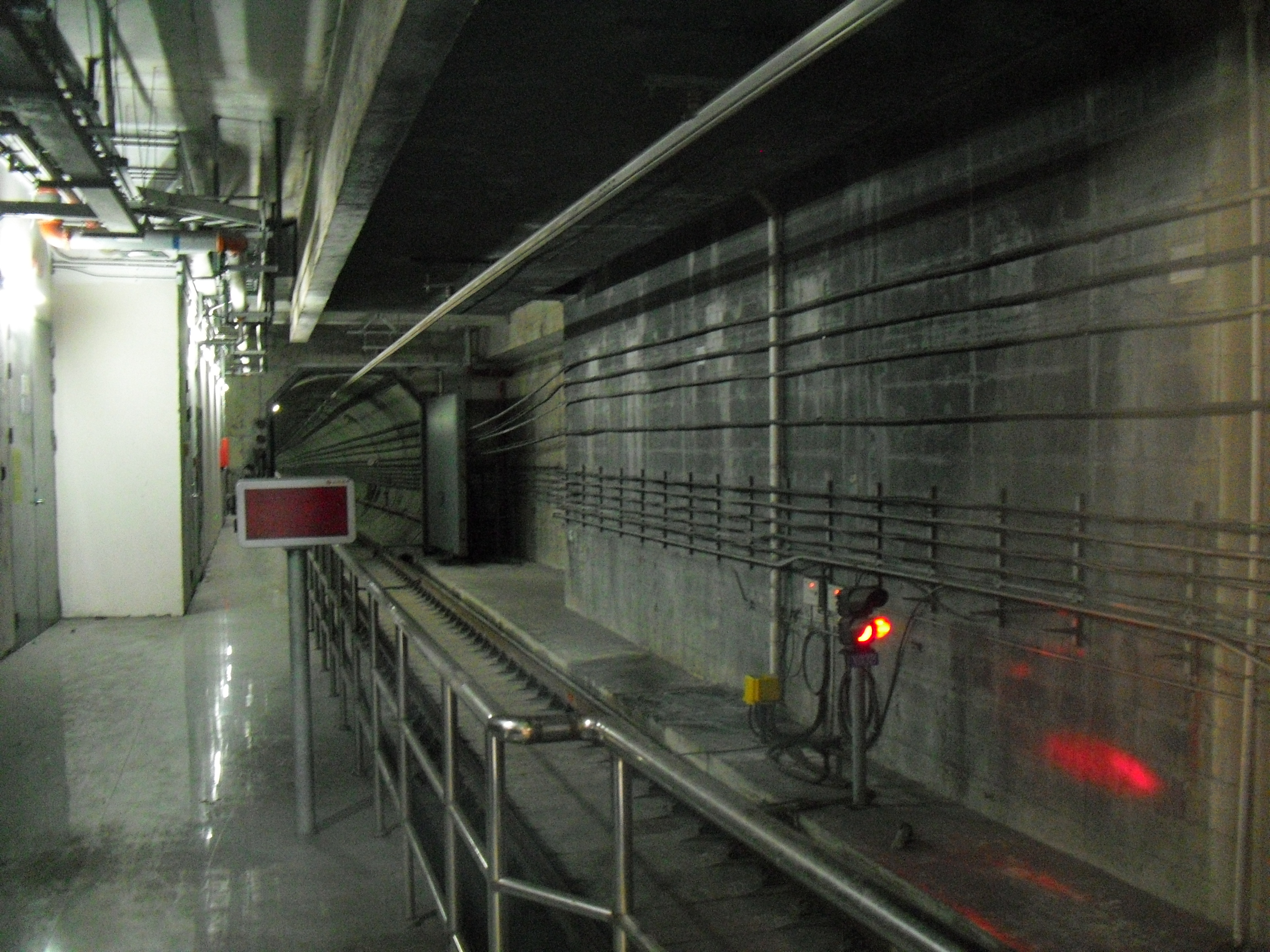 上海轨道交通13号线的隧道，摄于祁连山南路站。